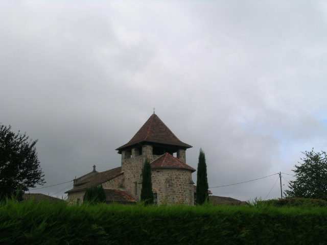 L'église de Prendeignes